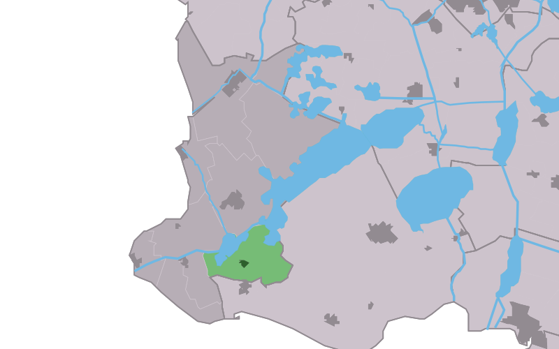 Kaartsje fan himrik fan Hemelum